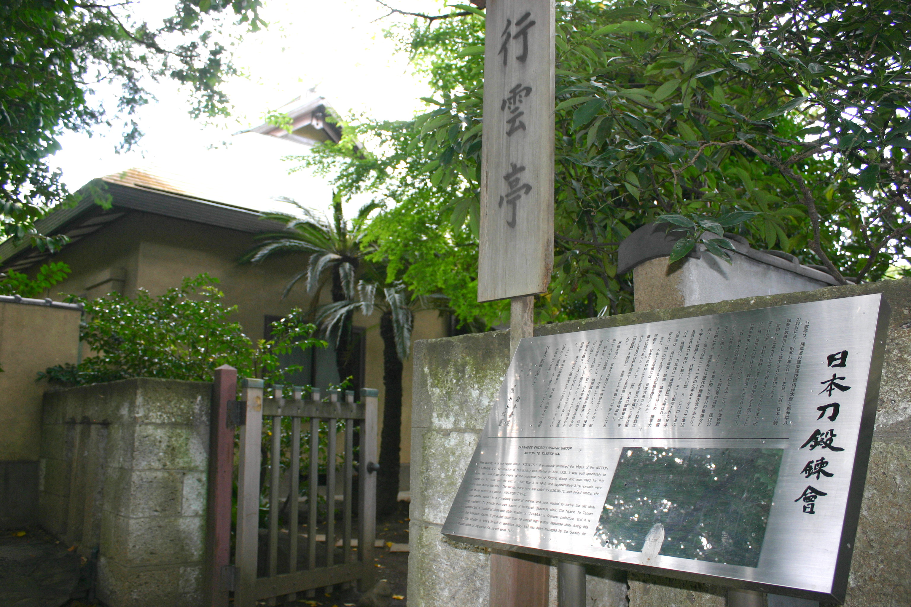 現在は裏千家の教室だが、かって日本刀鍛錬会が置かれた。